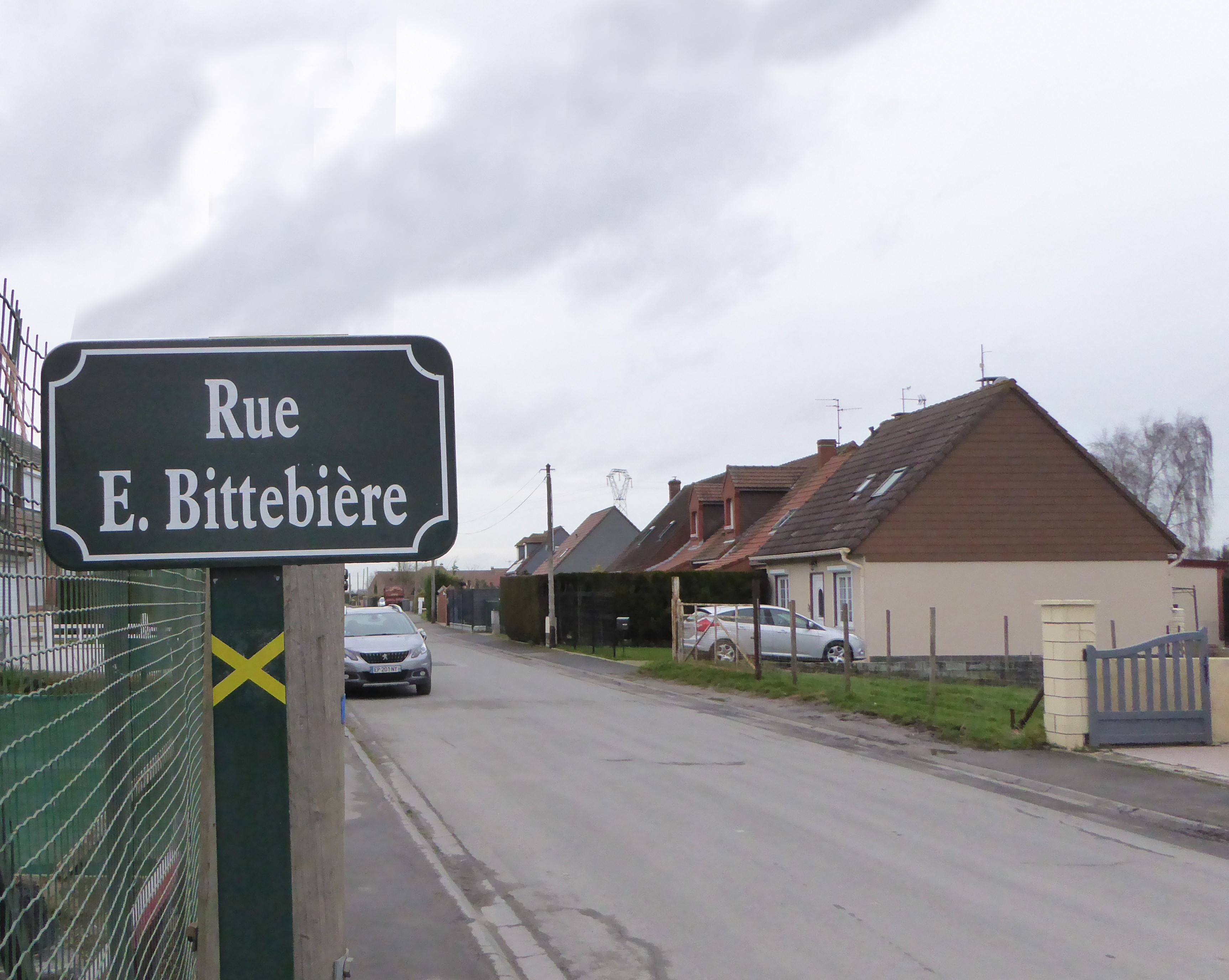 Plaque de la rue Emile Bittebière, maire durant 20 années de la commune de Hantay, Nord.-France